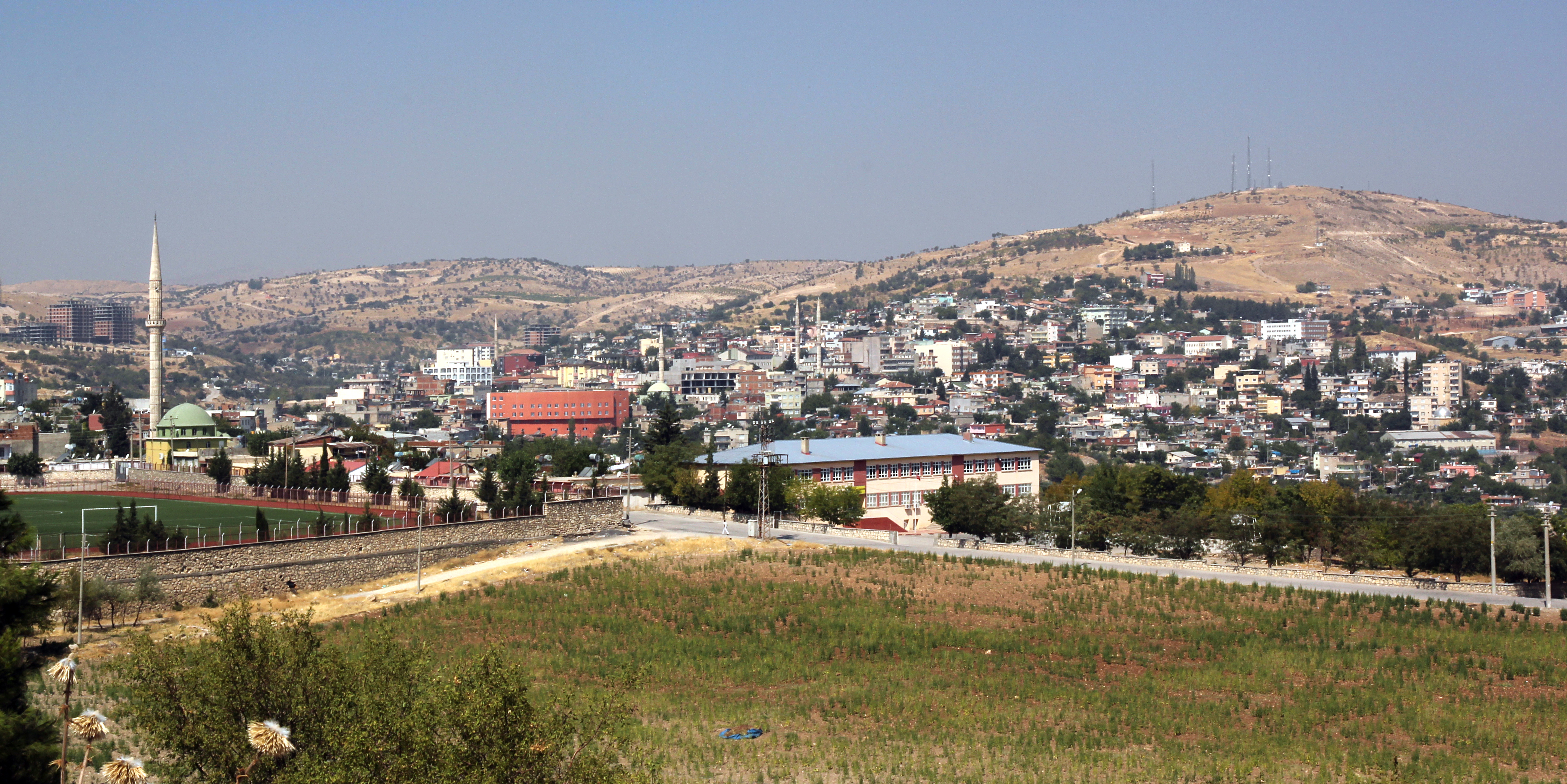 Besni, Provinz Adıyaman, Türkei, von Osten